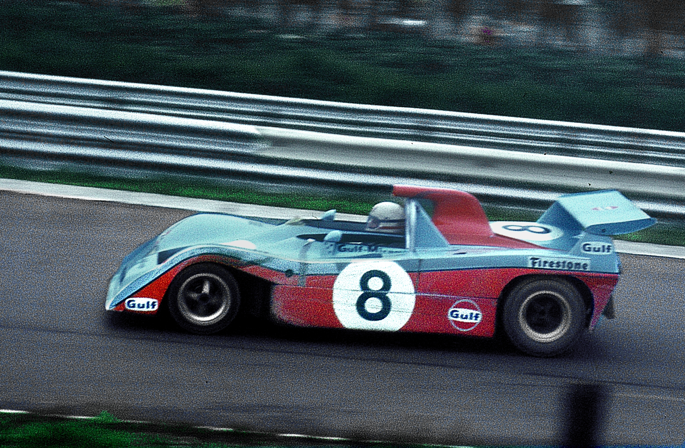 Derek Bell im Mirage M6 eingangs Südkehre